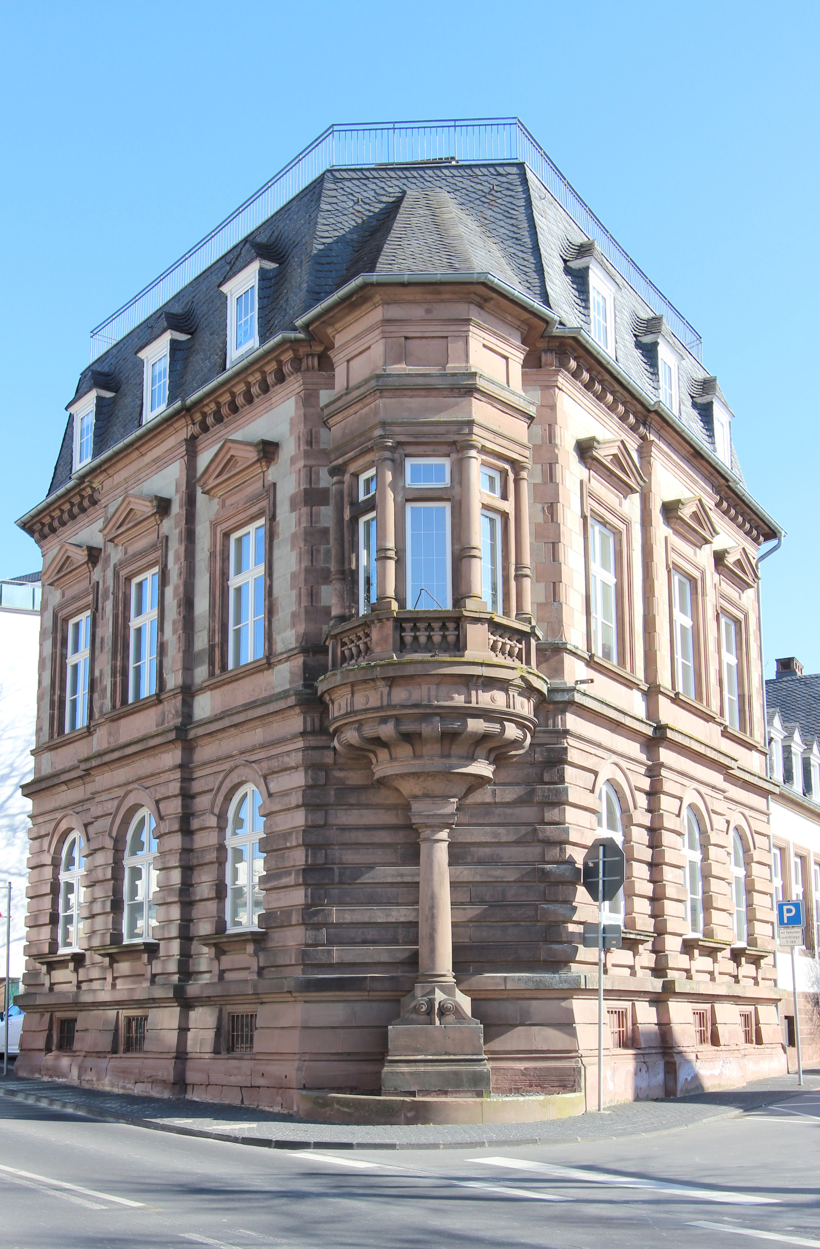 54634 Bitburg, Römermauer 1. Das Gebäude wurde 1887 an der Einmündung der Schakengasse errichtet. Es weist Züge der italienischen und der deutschen Renaissance auf und diente als repräsentatives Wohnhaus. Aufnahme von 2018.